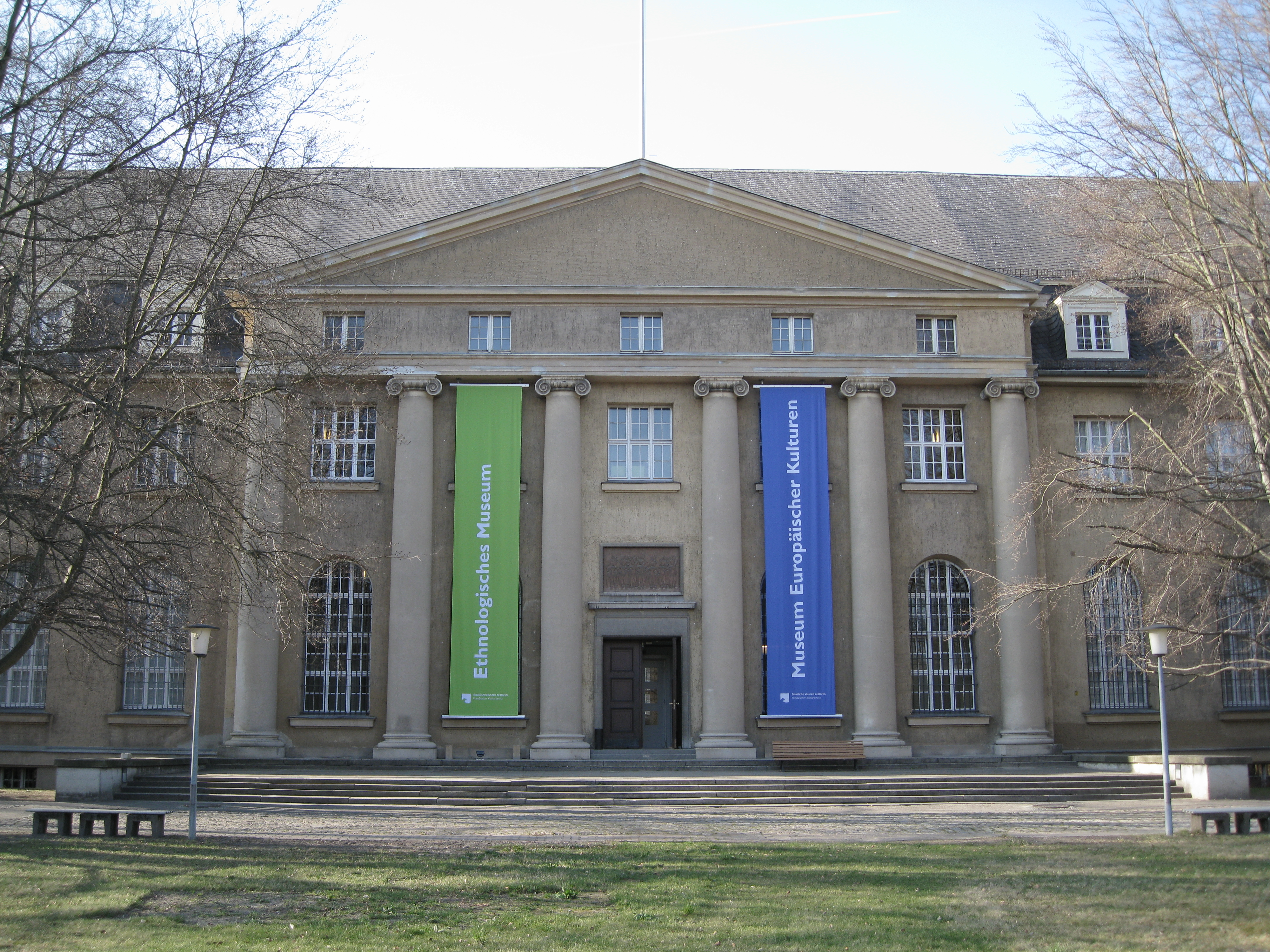 Museum für Völkerkunde